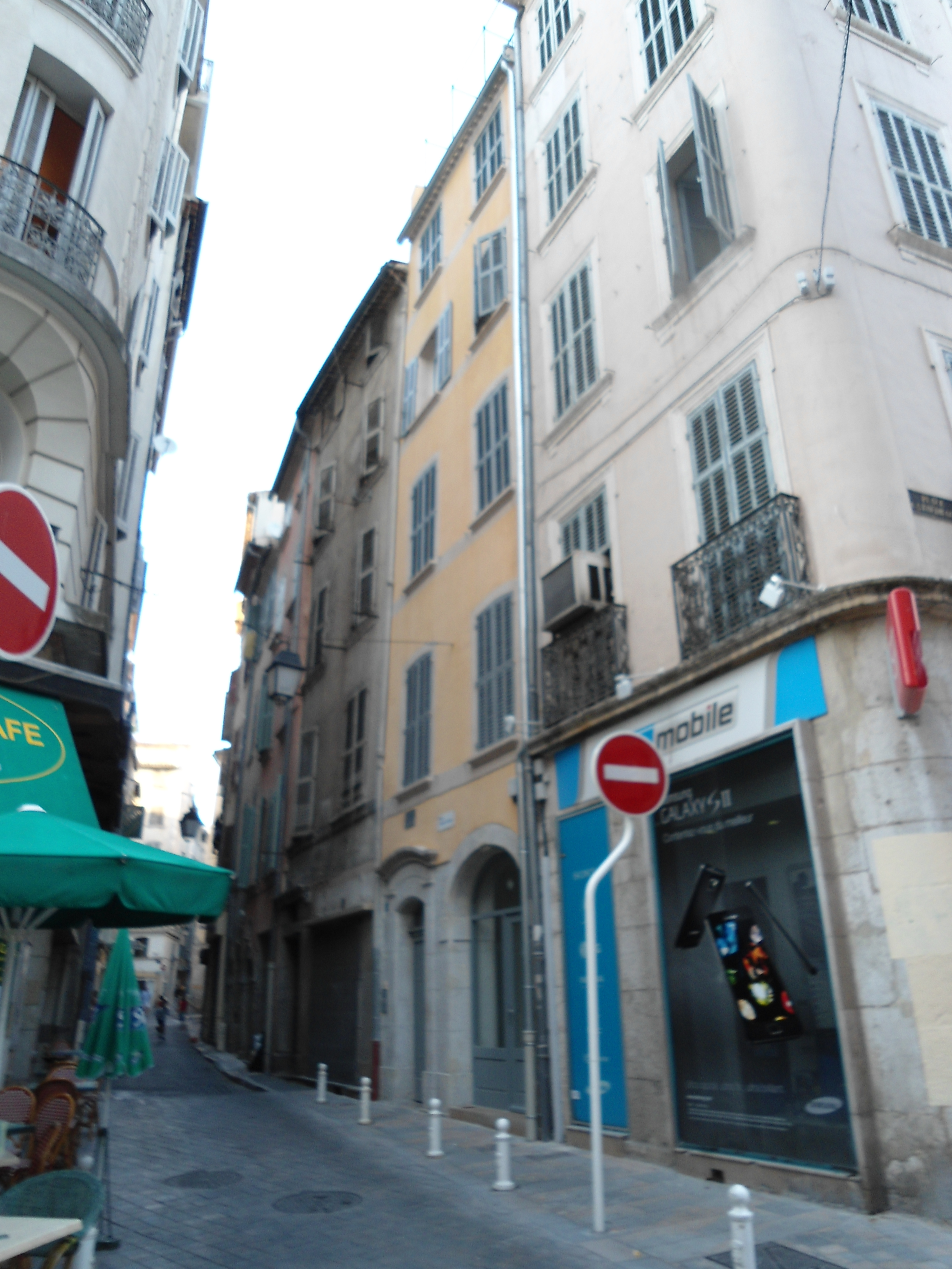 Runa Simi: Esteve Pelabon pa wasin Tolonpi